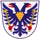 znak obce Hradčovice